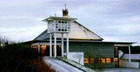 Landro Kirke Fjell kyrkjelyd